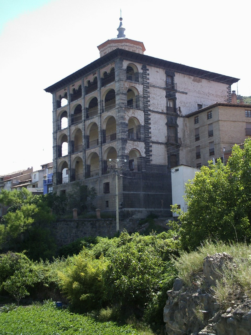 Igea - La Rioja (Spain)